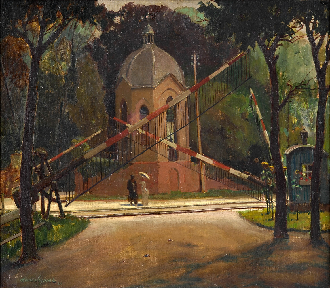 Der alte Bahnübergang am Haus Meer in Büderich, 1926, Öl auf Leinwand, 48 x 56 cm